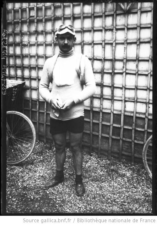 [Paris-Tours, 1913], Gustave Garrigou [portrait du coureur cycliste avant le départ]